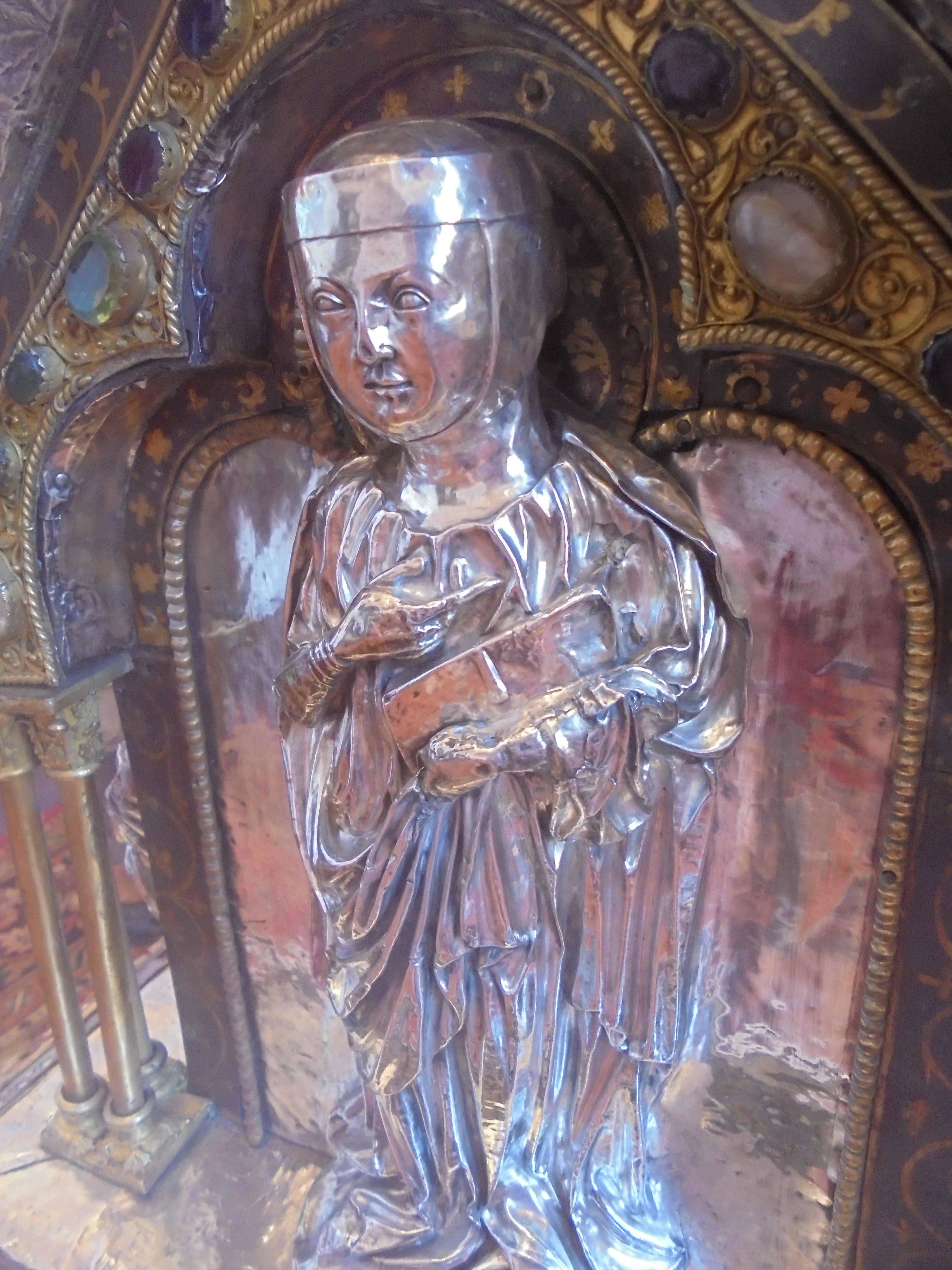 Pignon représentant Sainte Ode de la châsse d'Amay, réalisé vers 1245-1255. Classé comme trésor de la Communauté Française depuis le 23 Novembre 2010.